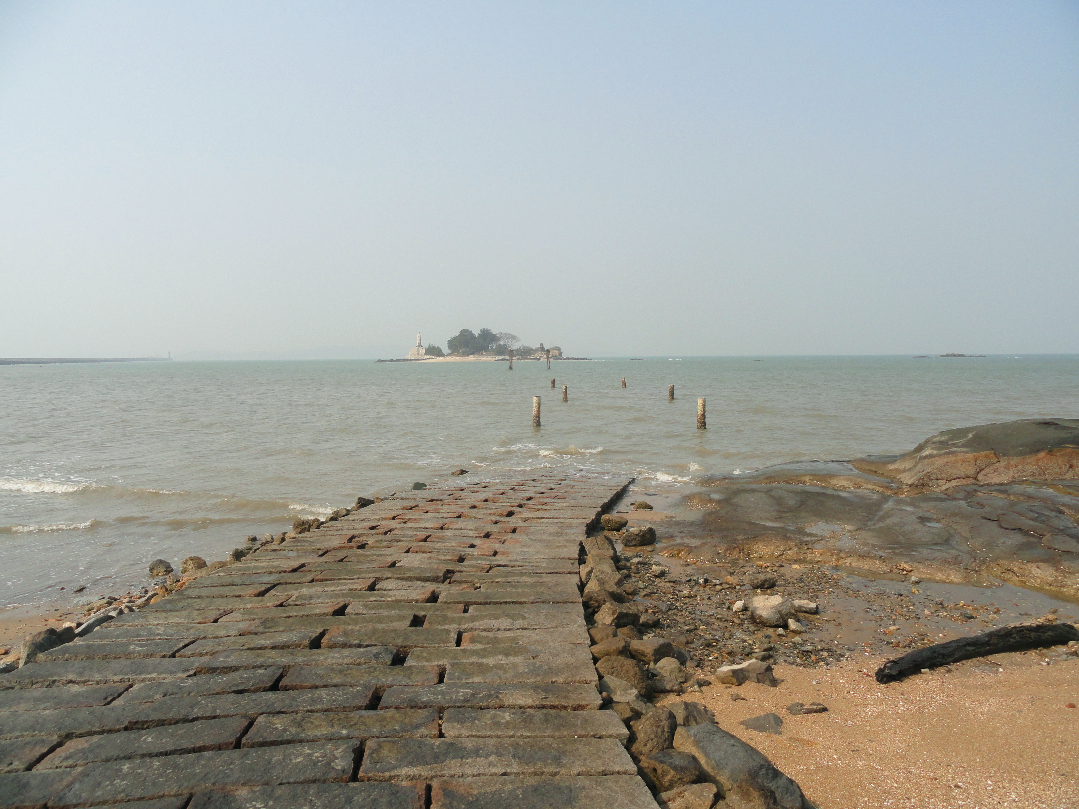 中文（中国大陆）: 建功屿，当海水退潮后人可直接走上岸